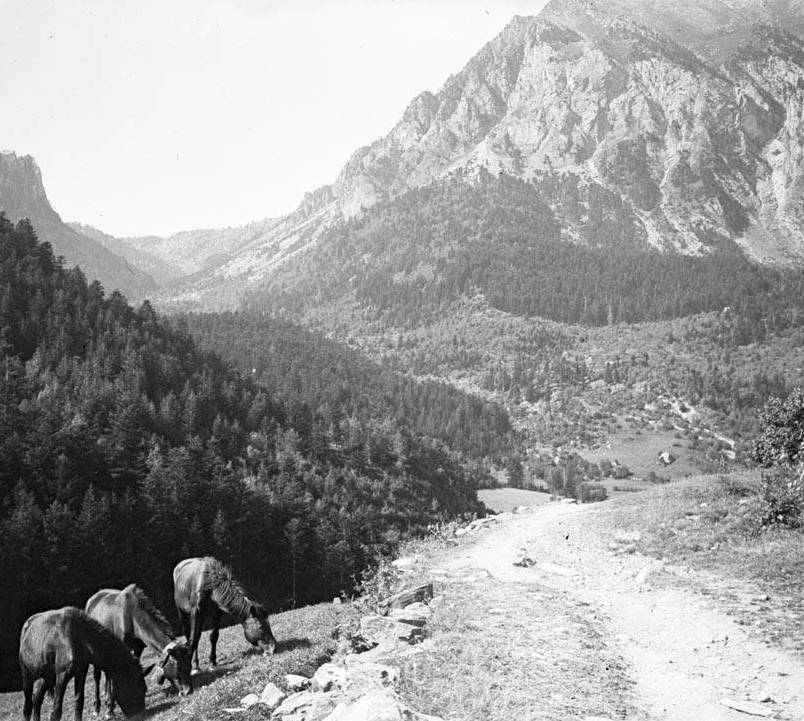 Imatge